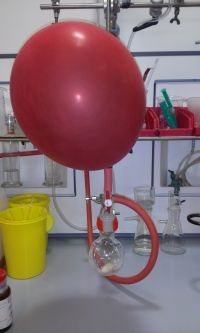 Kemipøjser på rundbundet kolbe.